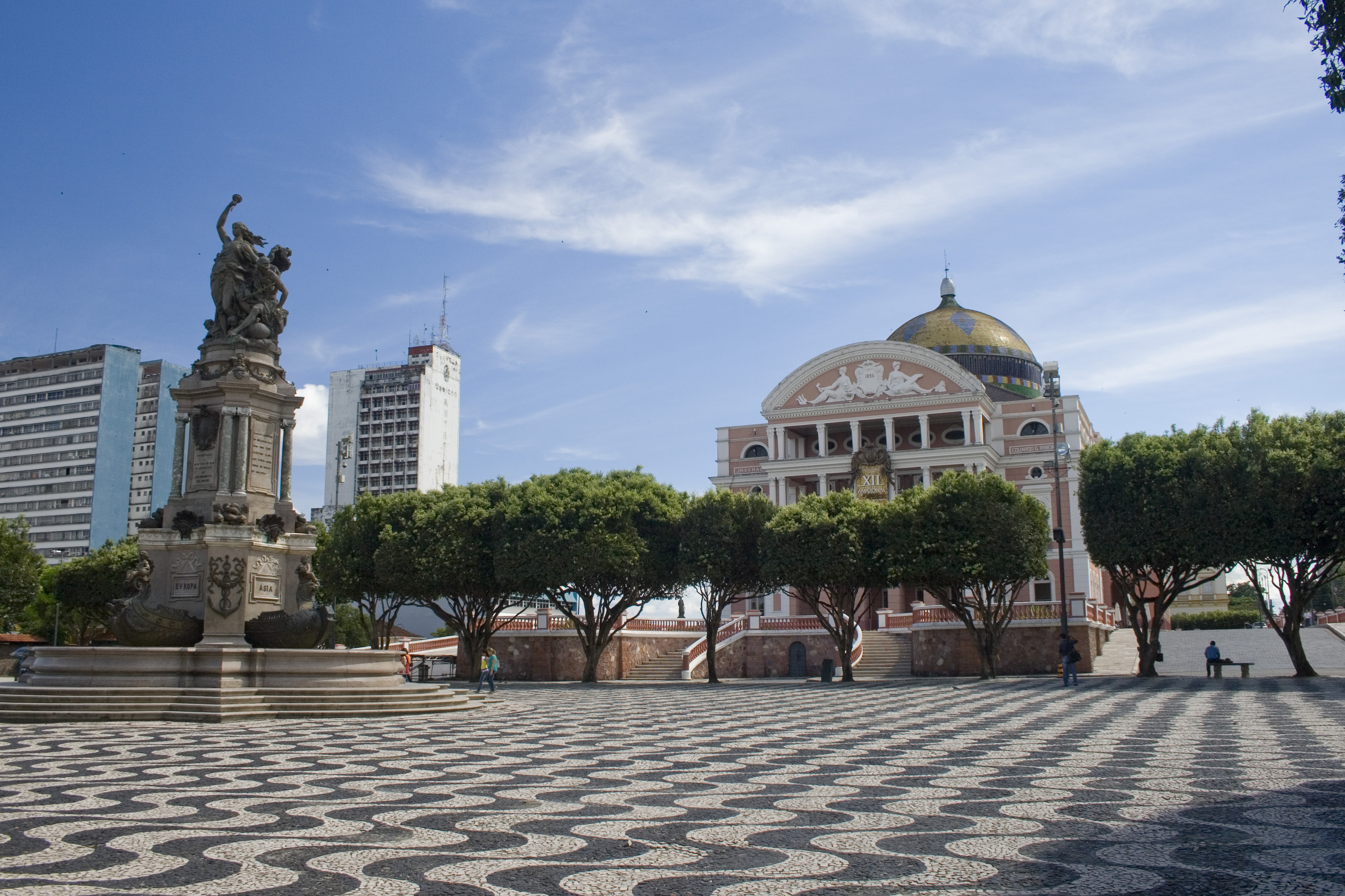 Português do Brasil: Praça do Teatro Amazonas, Manaus.